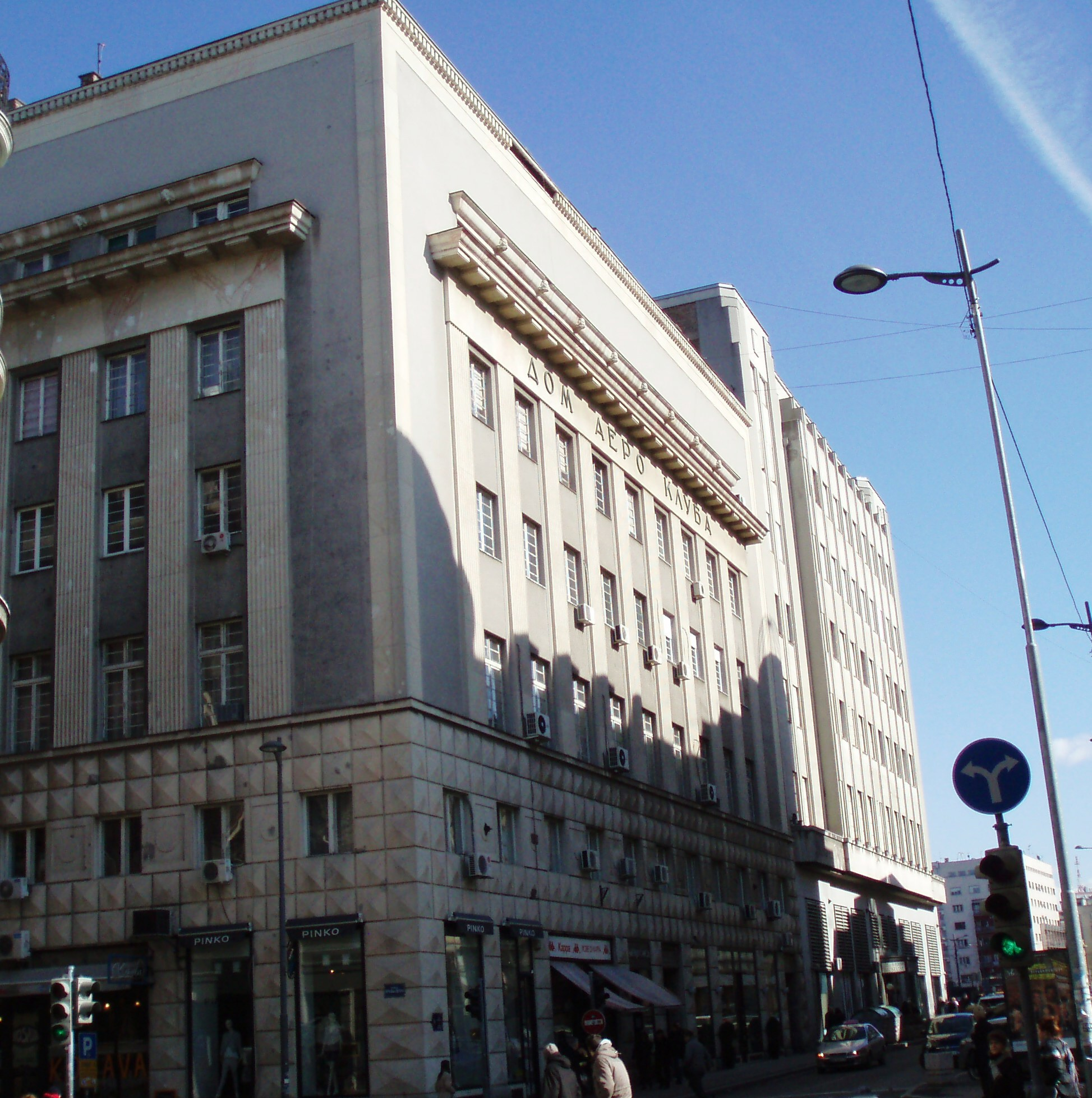 Фотографија Дома Аероклуба у Београду Ул. Узун Миркова, Аутор: Nicolo